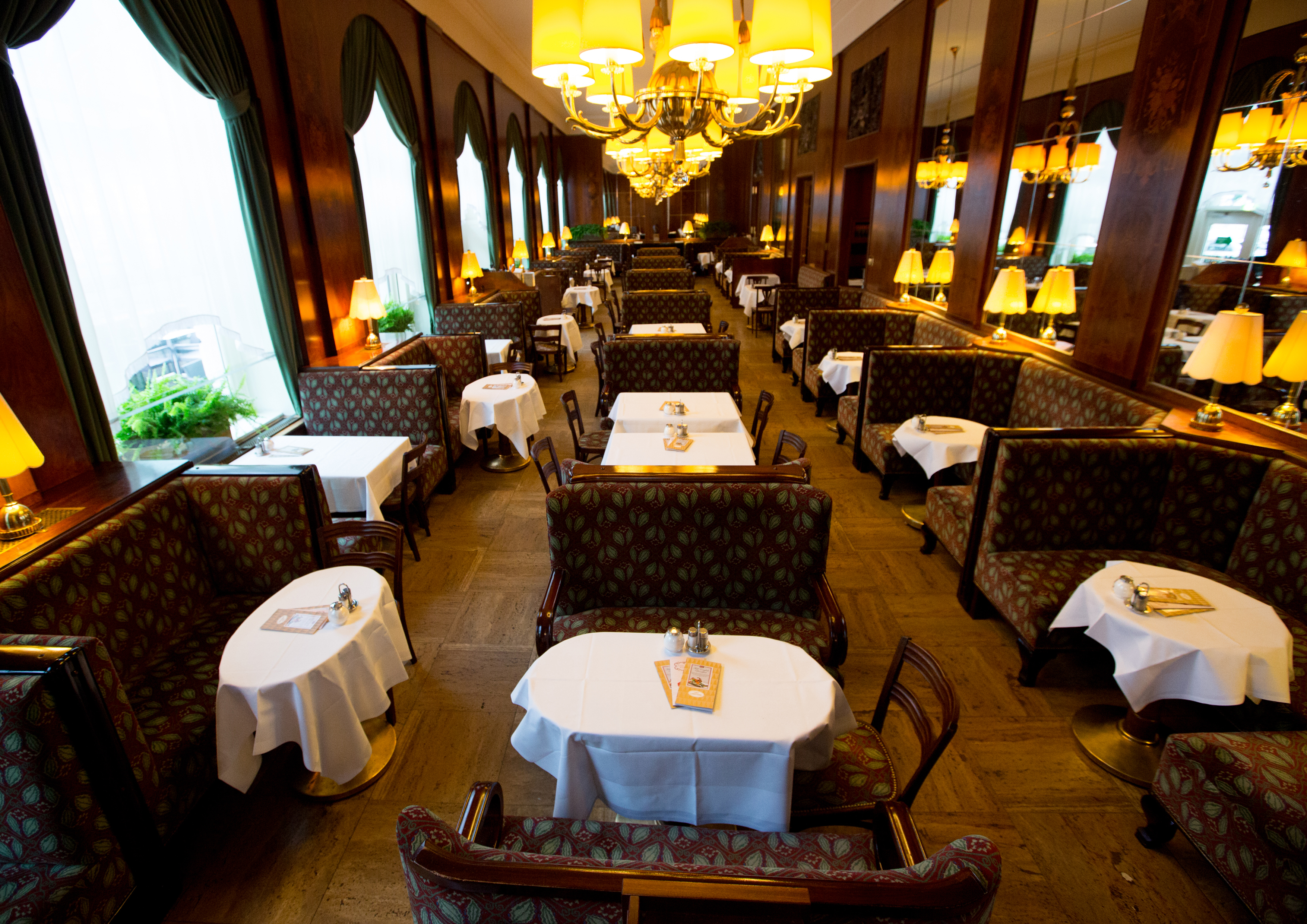 Großer Saal im Cafe Landtmann